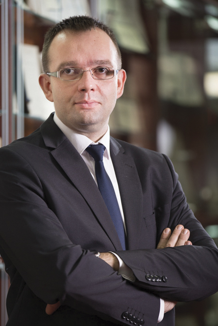 Бојан Тубић.